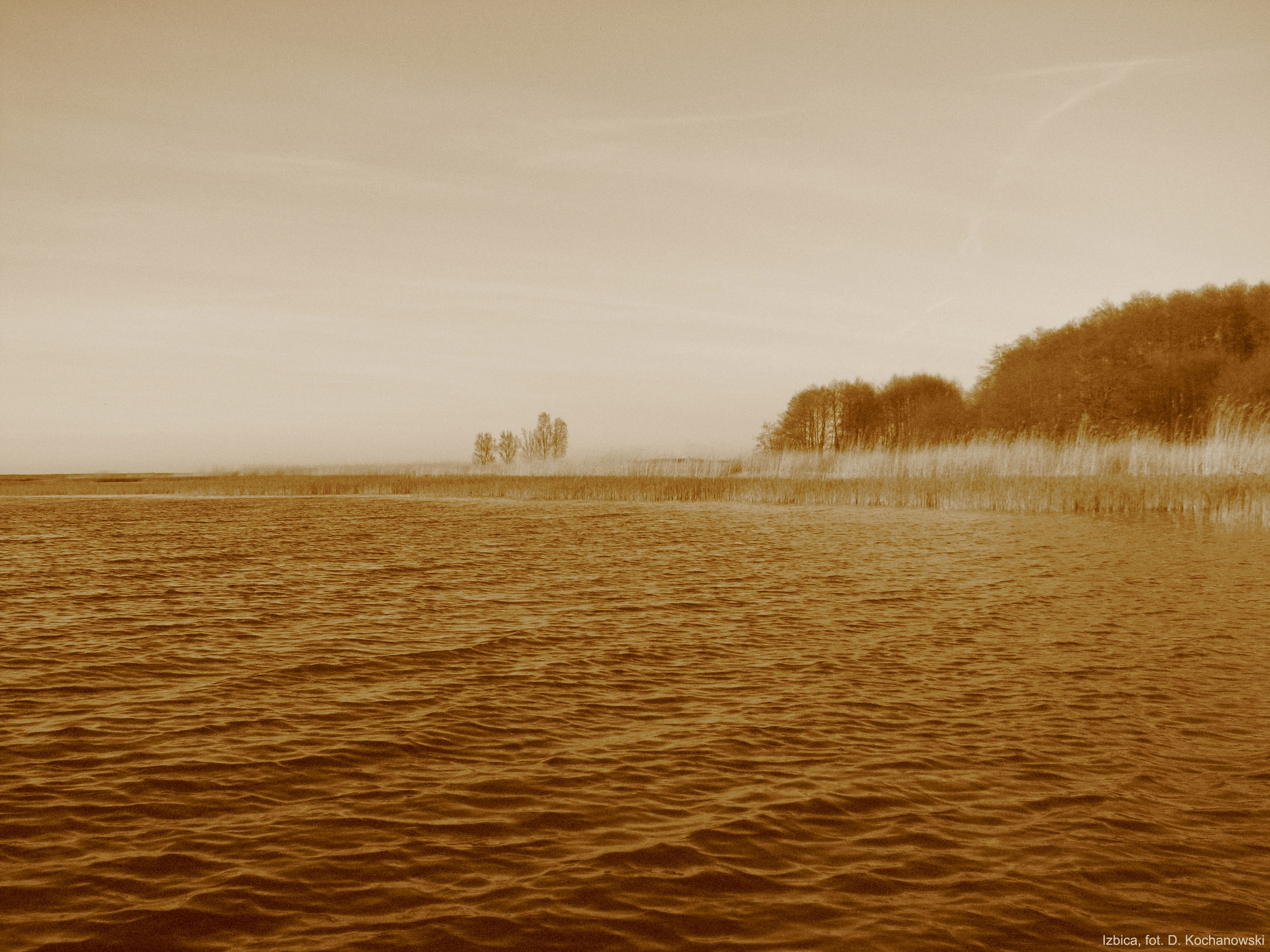 Zdjęcie przedstawiające sukcesję ekologiczną - eutroficzne jezioro zarastające szuwarem trzcinowym.